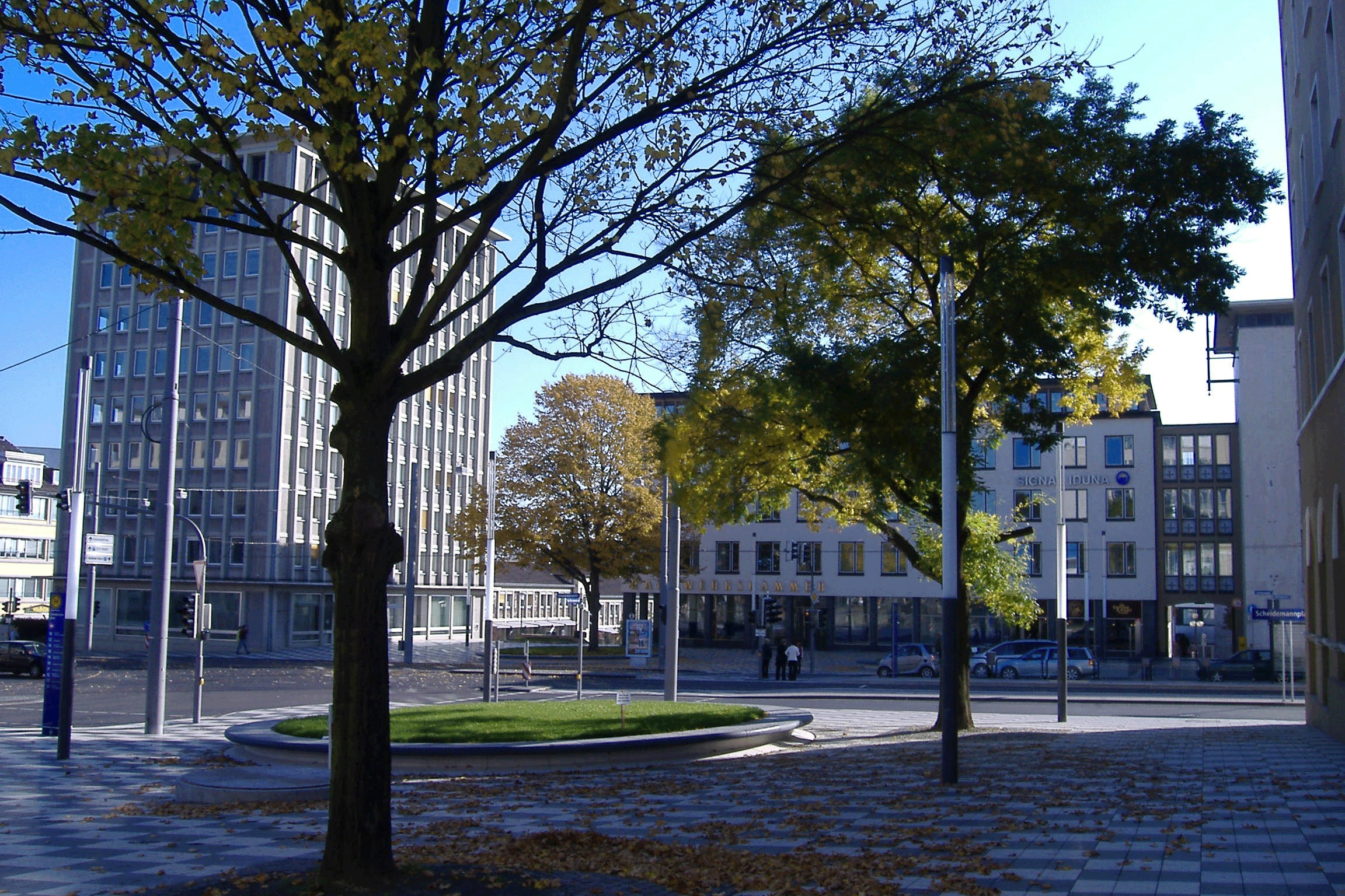 Foto des 2005 neu gestalteten Scheidemannplatzes in Kassel. 16:42, 30. Okt 2005 Guido Bockamp 2304 x 1536 (2140434 Byte) (Foto des 2005 neu gestalteten Scheidemannplatzes in Kassel. selbst fotogtafiert 30.10.2005) transfered to jpg by Matt314